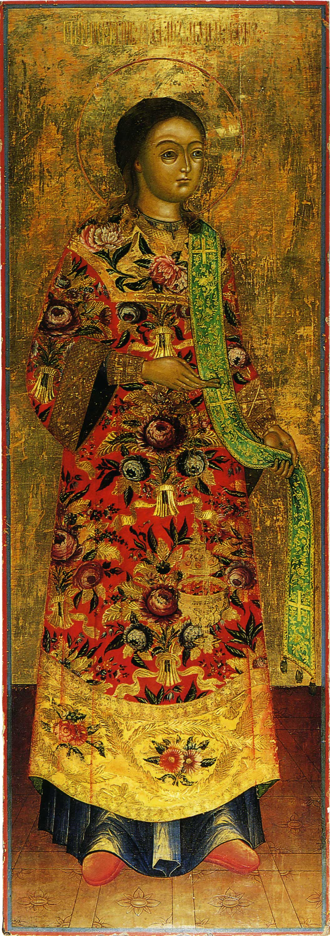 Архидиакон Стефан. Северная дверь жертвенника Круг Чернобровиных (?) Школа или худ. центр: Невьянск Вторая четверть XIX в. Дерево, шпонки врезные сквозные фигурные и торцовые. Паволока тканая, левкас, темпера, золочение. 200 × 70 × 3.8 см Свердловский областной краеведческий музей, Екатеринбург, Россия. Инв. И-321. Привезена в 1989 г. экспедицией музея из Невьянского района Свердловской области. Реставрация: 1992–1995 — Белкин А. А.